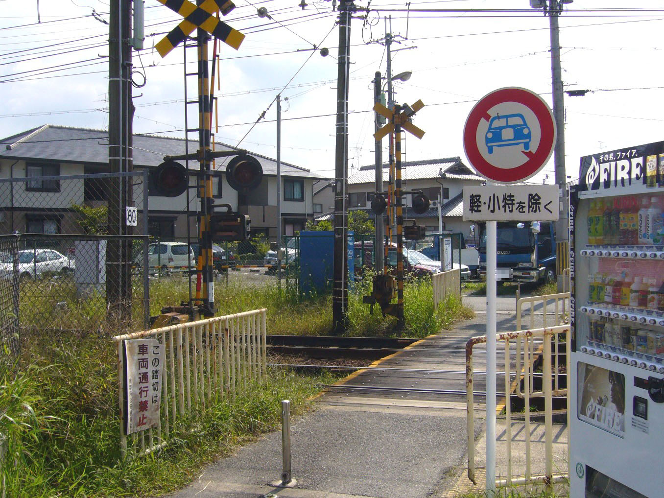 叡山電鉄鞍馬線木野駅の構内踏切。2008年10月4日に投稿者が撮影。